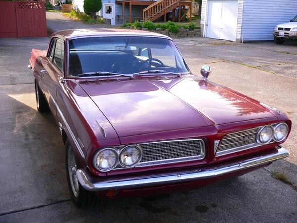 1963 Pontiac LeMans coupe